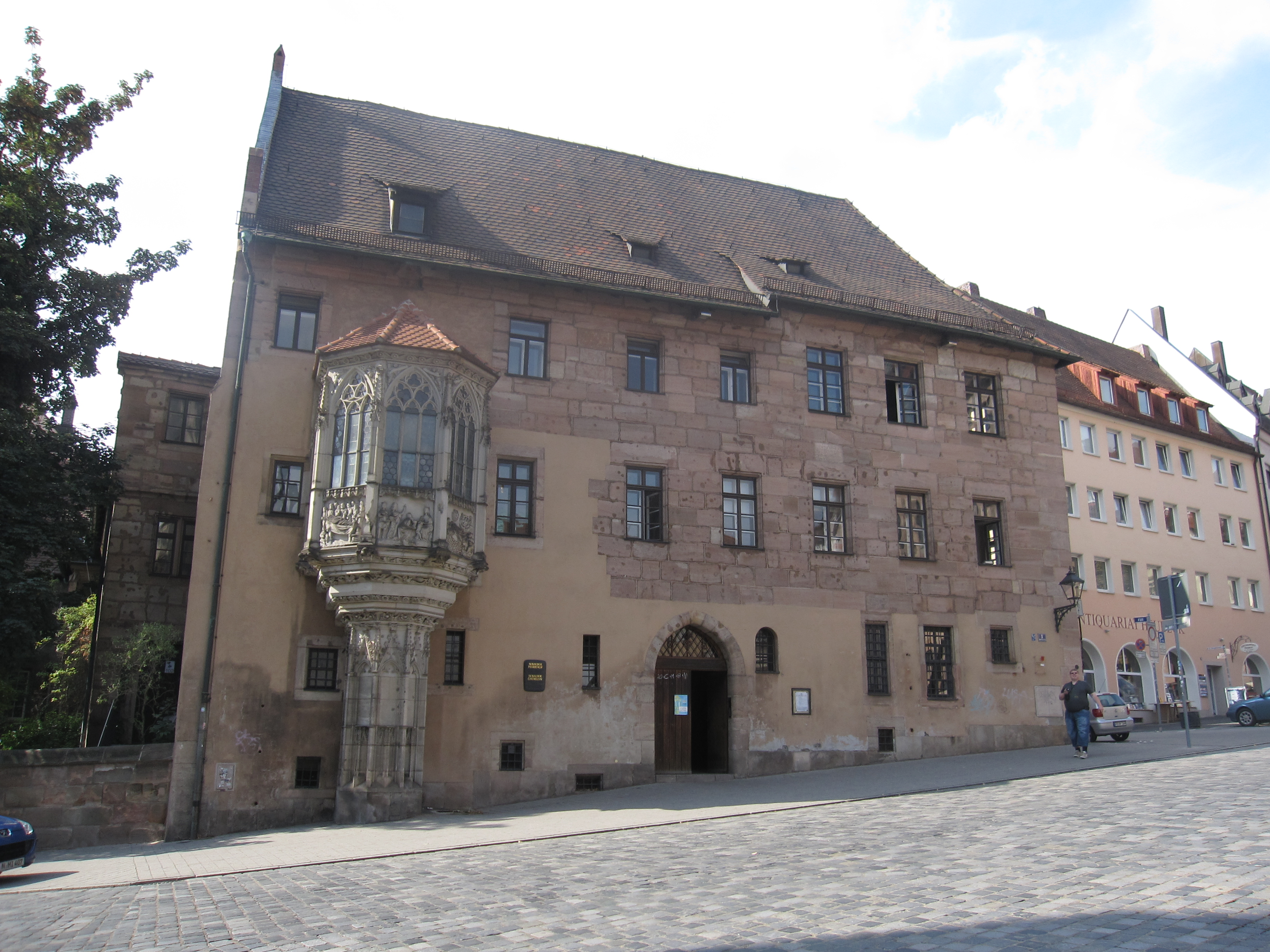 Sebalder Pfarrhaus in Nuremberg.